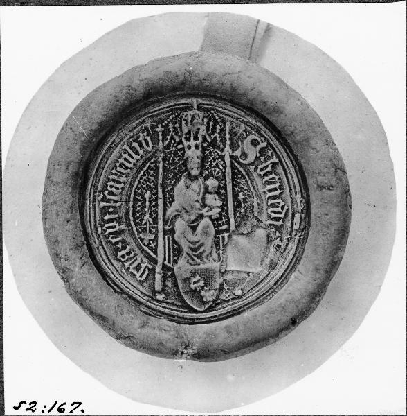 Sigill, Benkt Gustafsson, biskop i Skara 1452, R.A. pergament. Kategori: (11) Diverse Sigill, Benkt Gustafsson, biskop i Skara 1452, R.A. pergament.